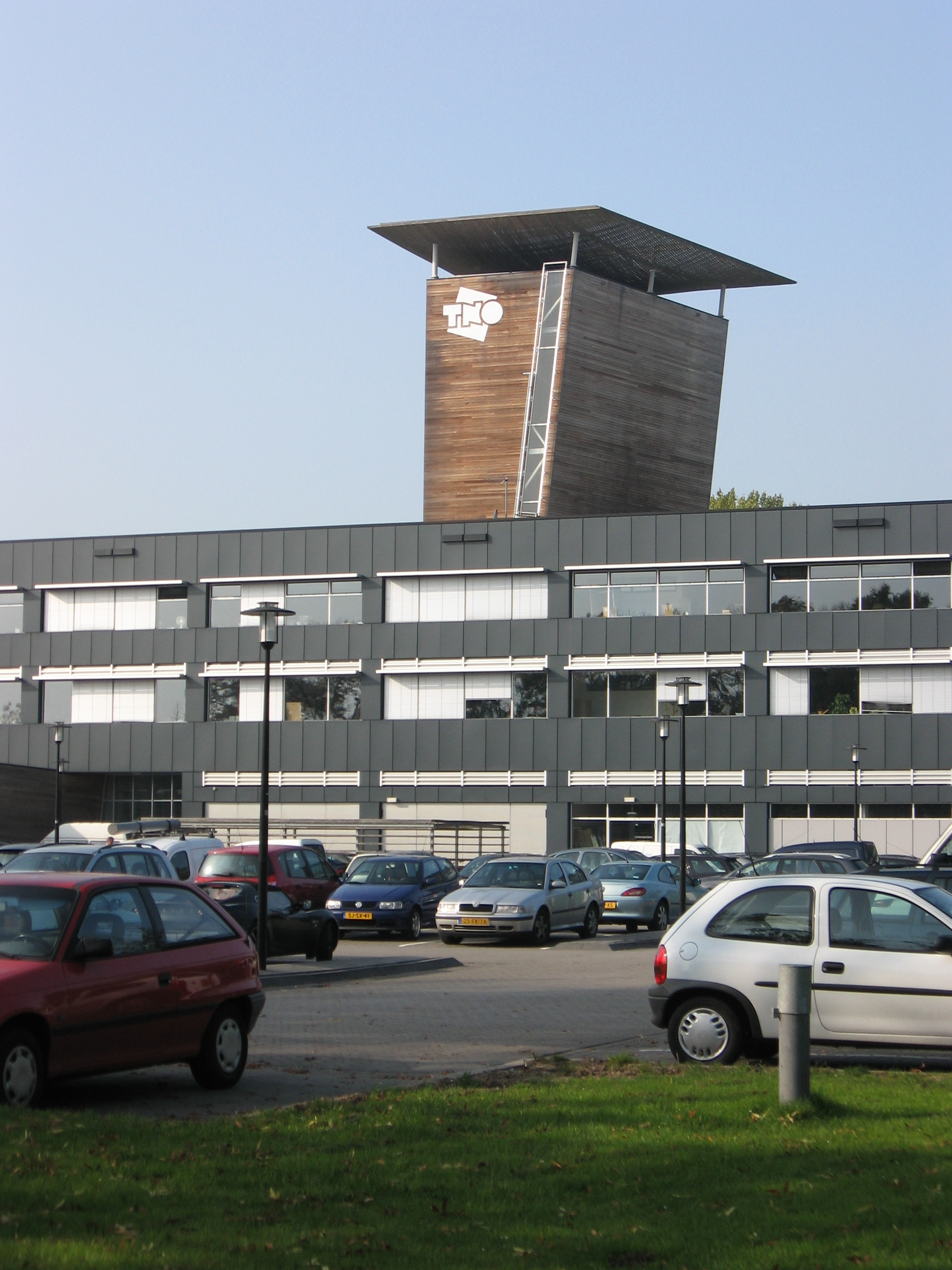 TNO Utrecht